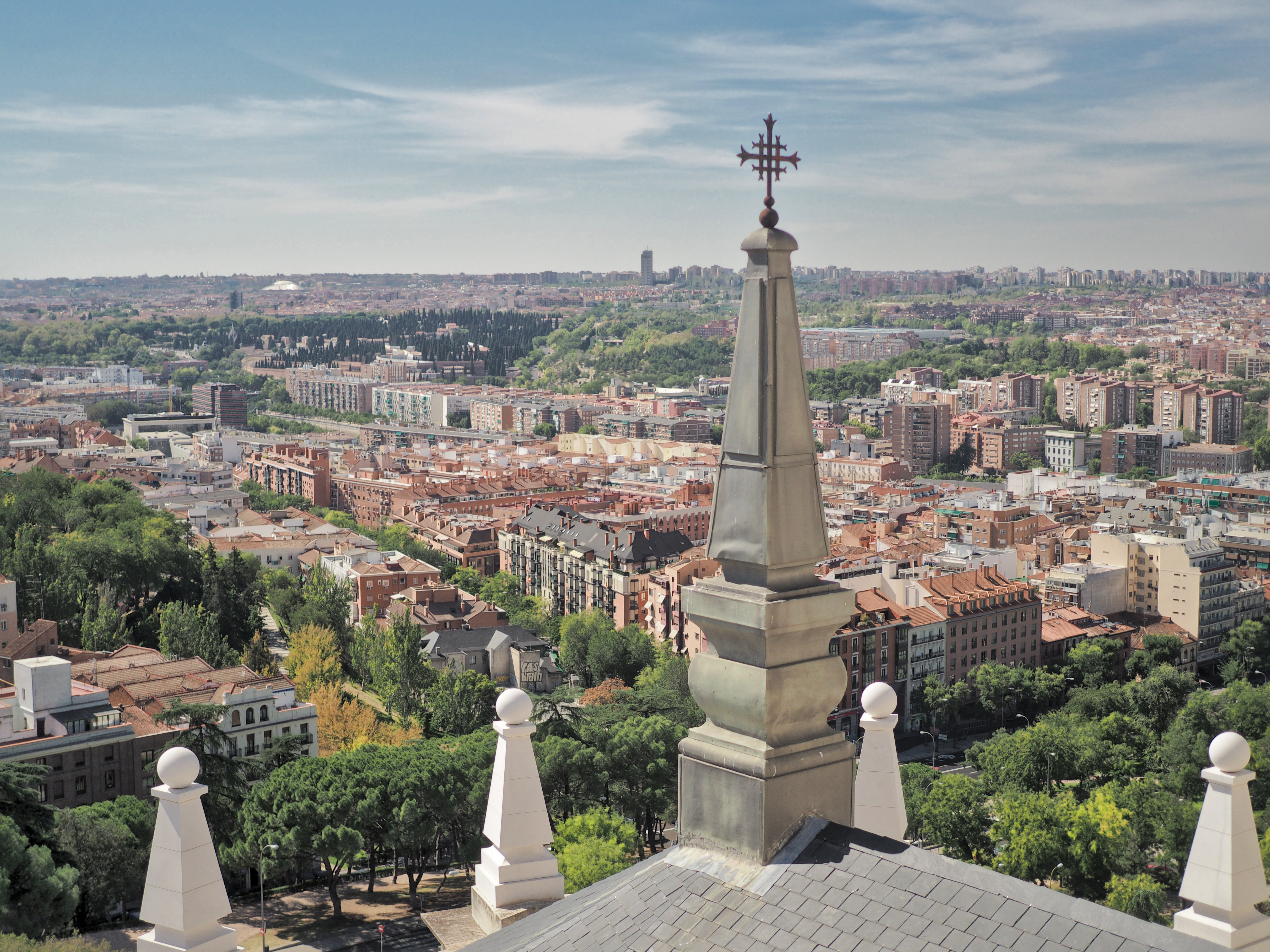 Madrid, Almudena